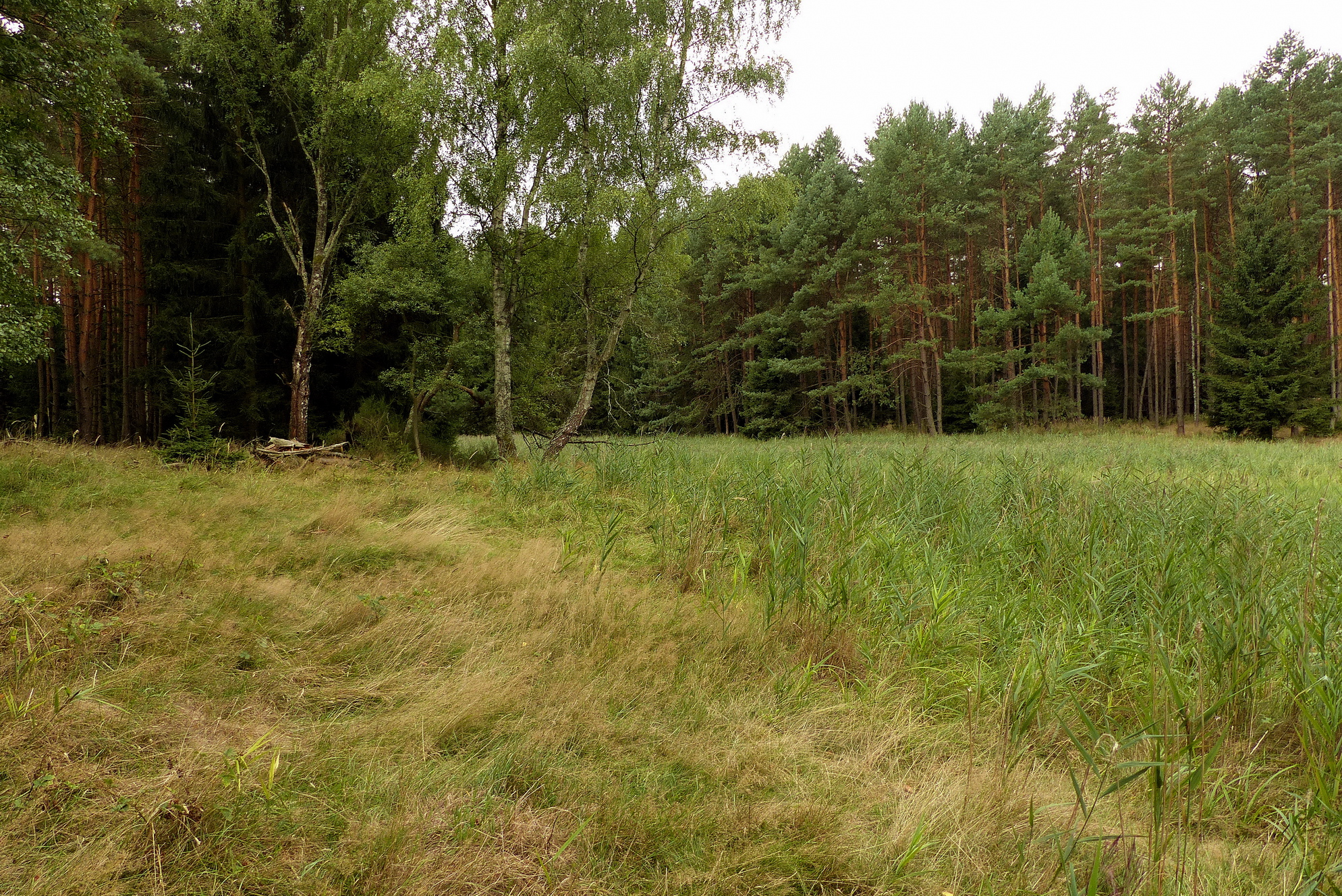 Přítoková niva Ploužnického potoka u bývalých Dolních Oken